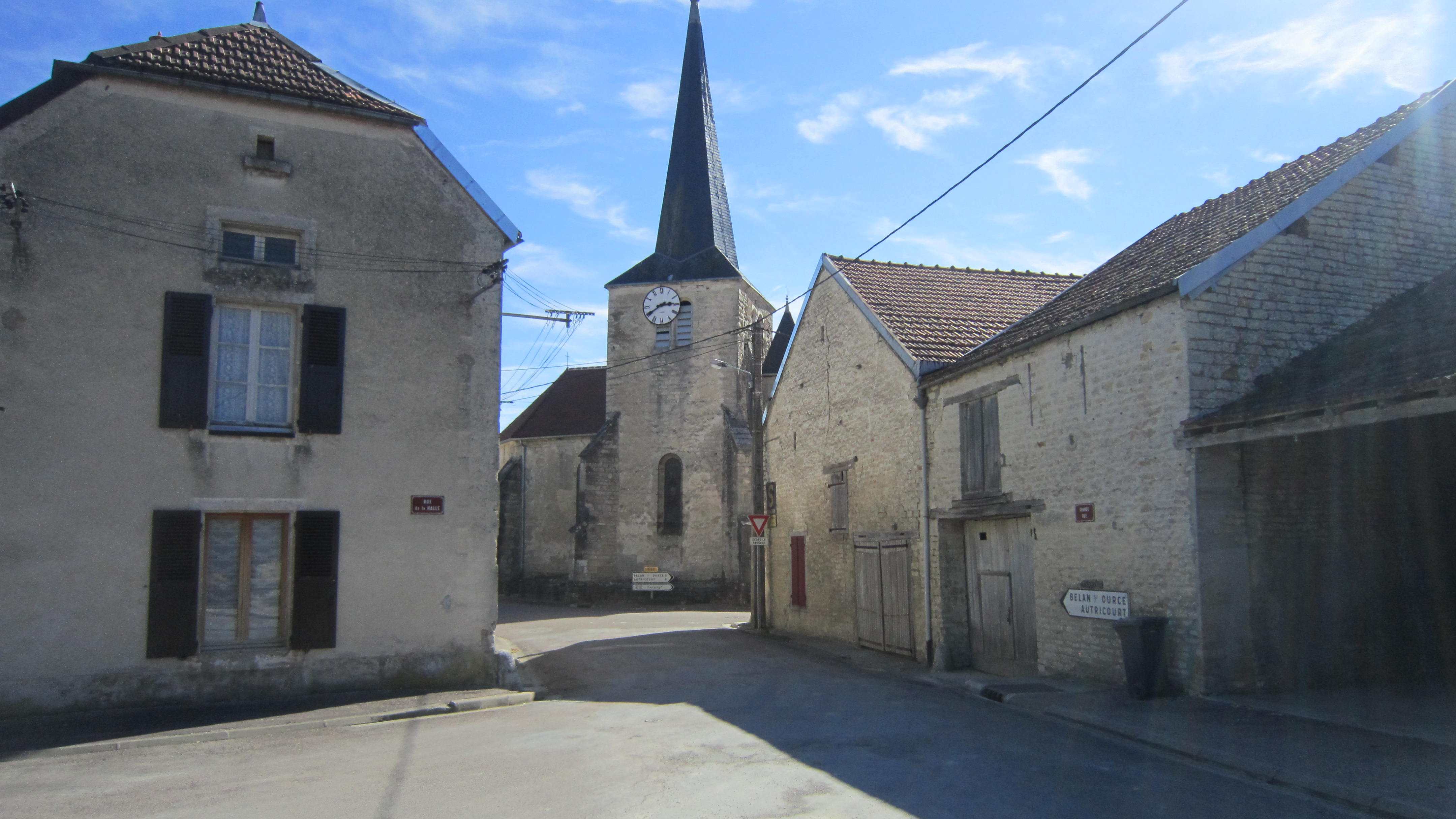 Eglise de Riel-les-Eaux (Côte-d'Or)